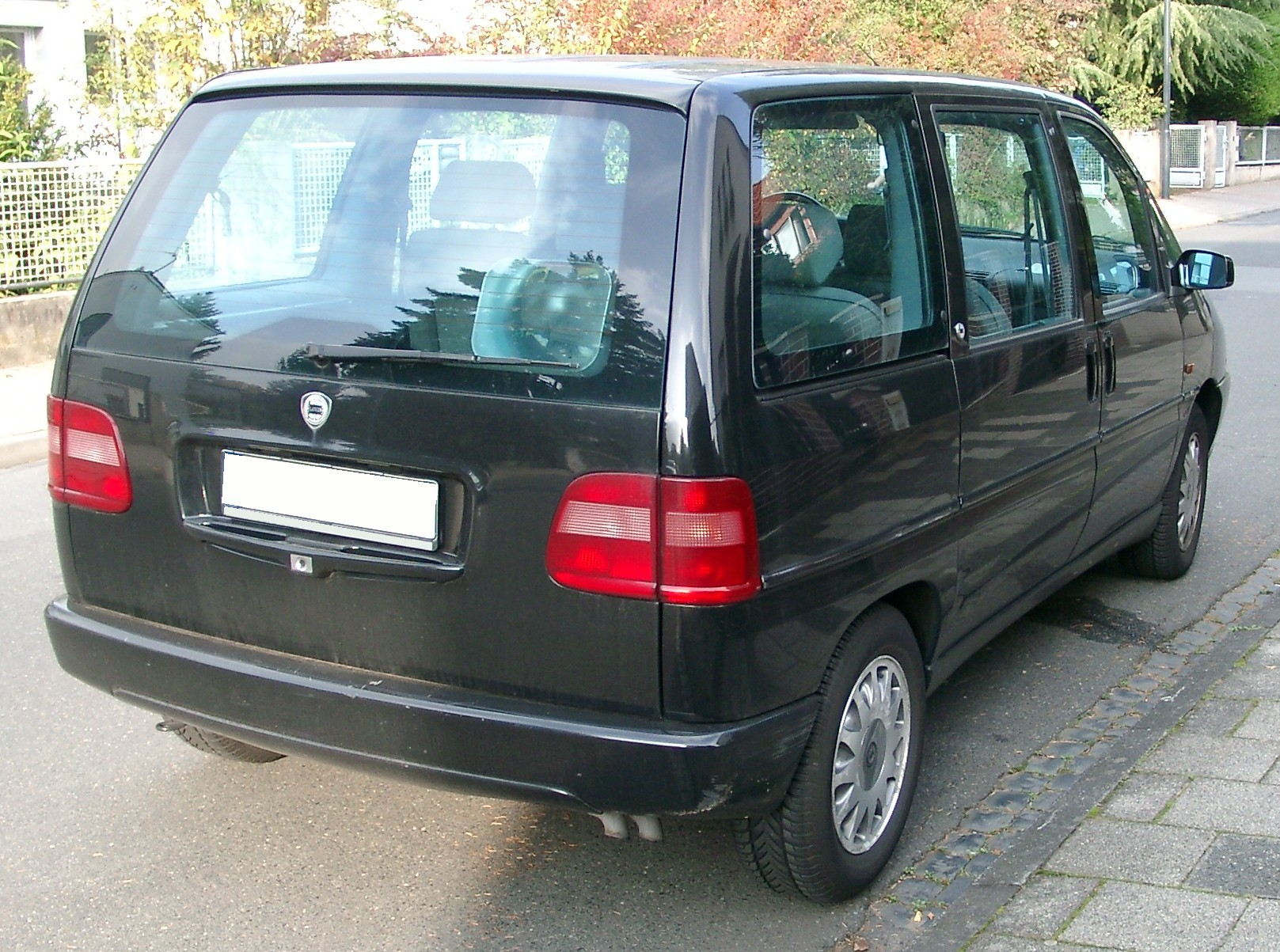 Lancia Zeta, 1. Generation